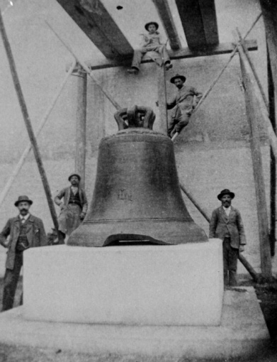 Schillerglocke in Schaffhausen, Switzerland